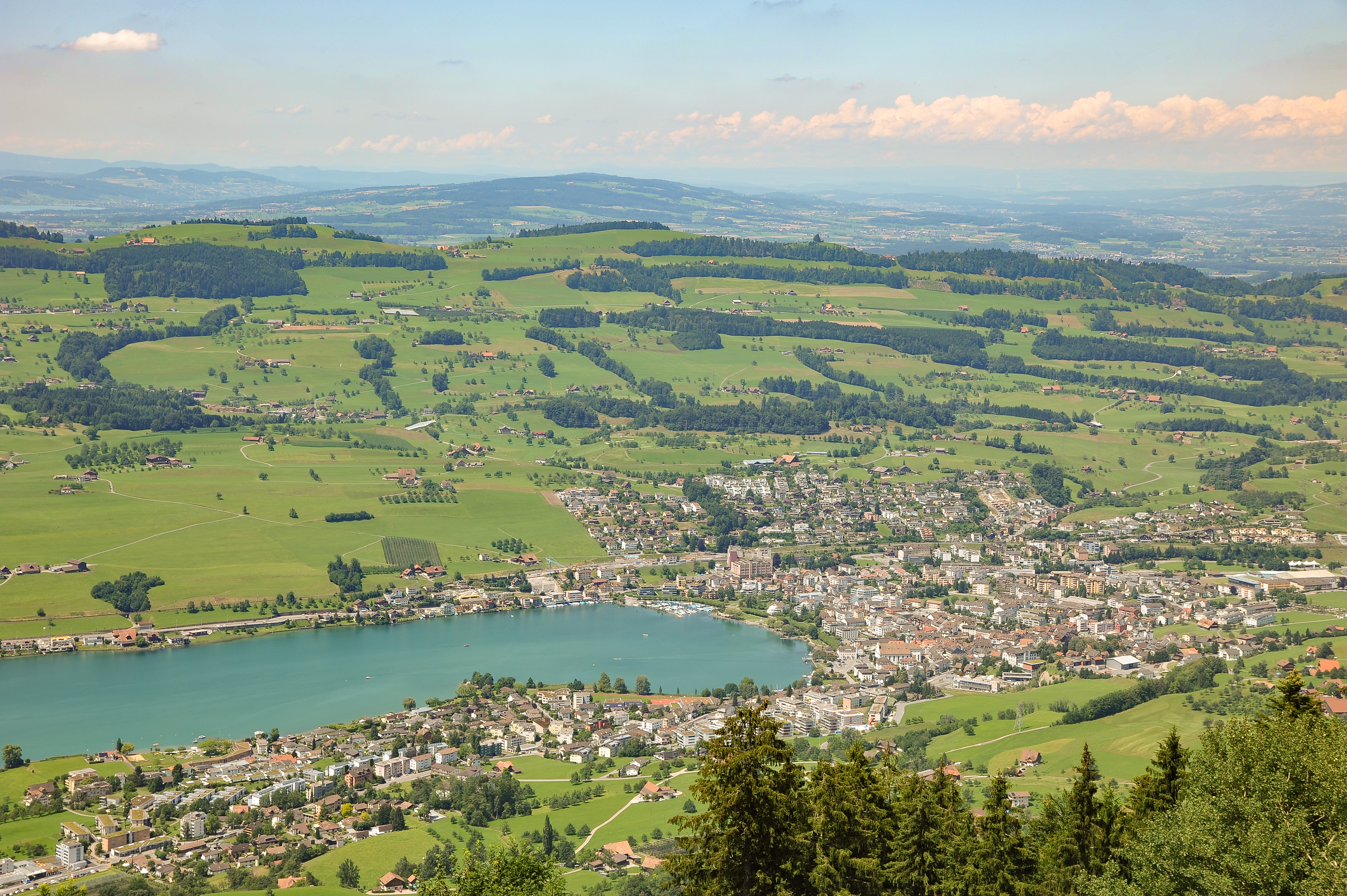 Küssnacht, von der Seebodenalp aus aufgenommen